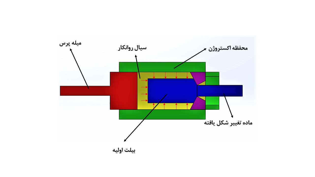 اکستروژن هیدرواستاتیک